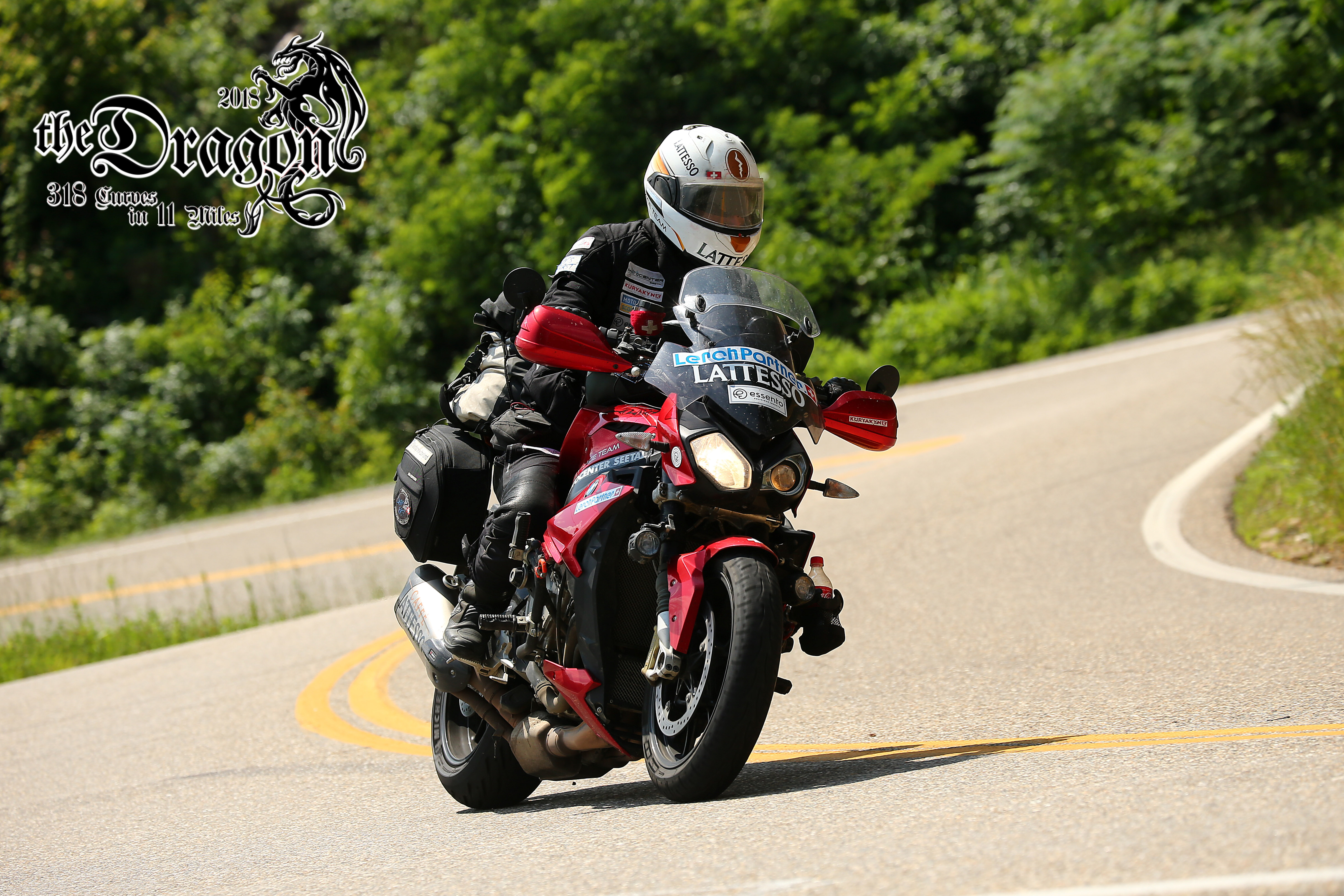 Isa am Dragontail USA